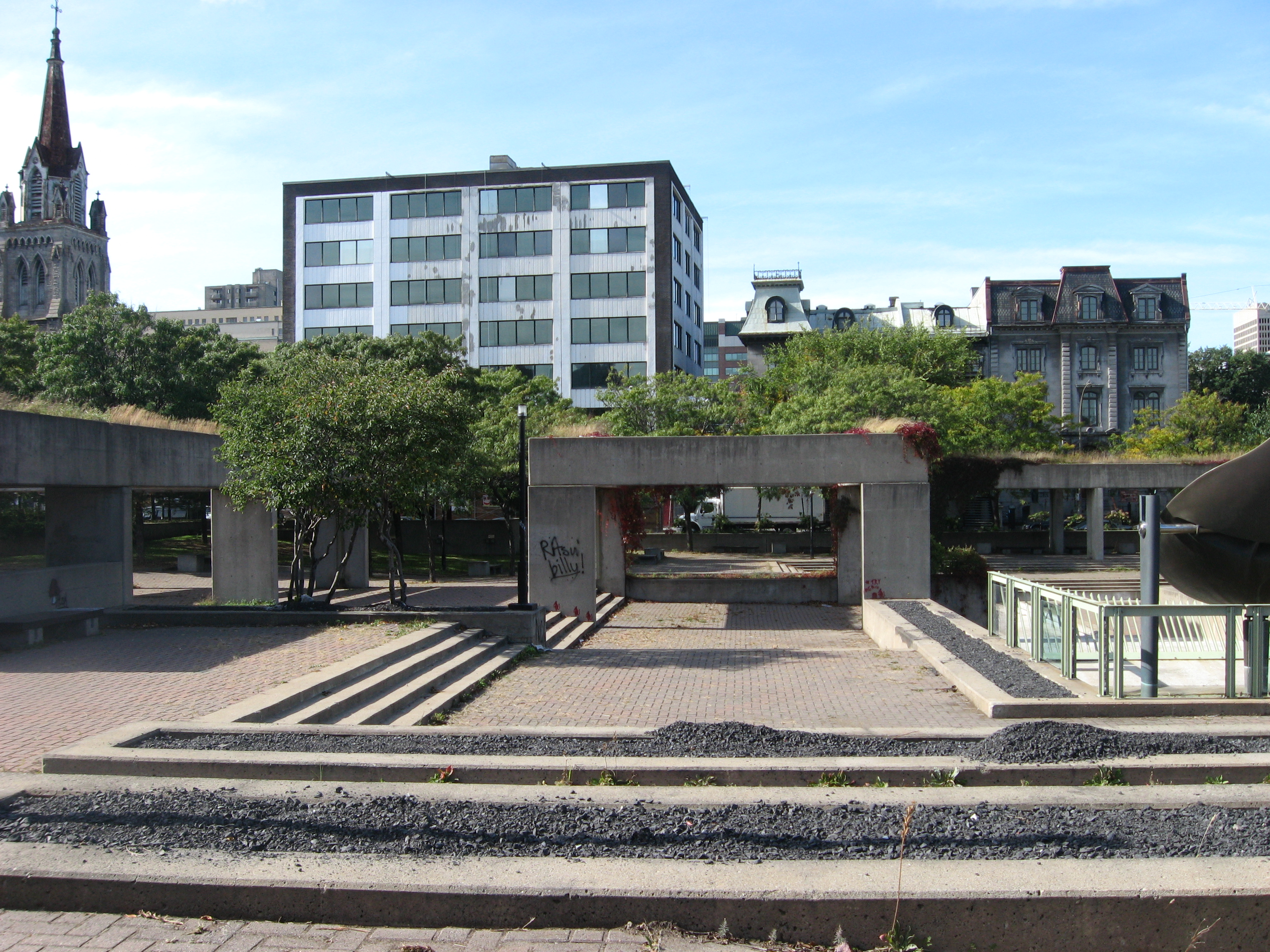 Square Viger, vue de l'oeuvre Agora de Charles Daudelin